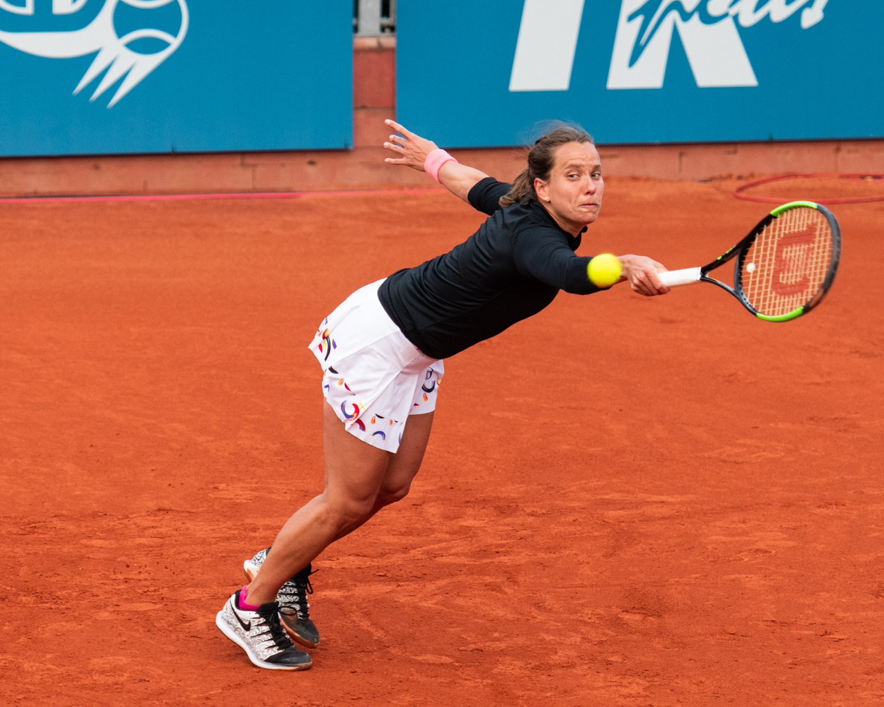 Barbora Strýcová